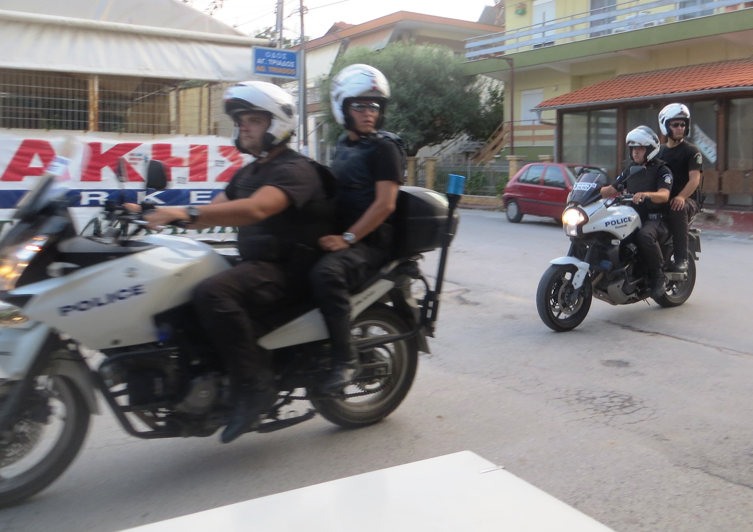 Griekse politie motorfiets